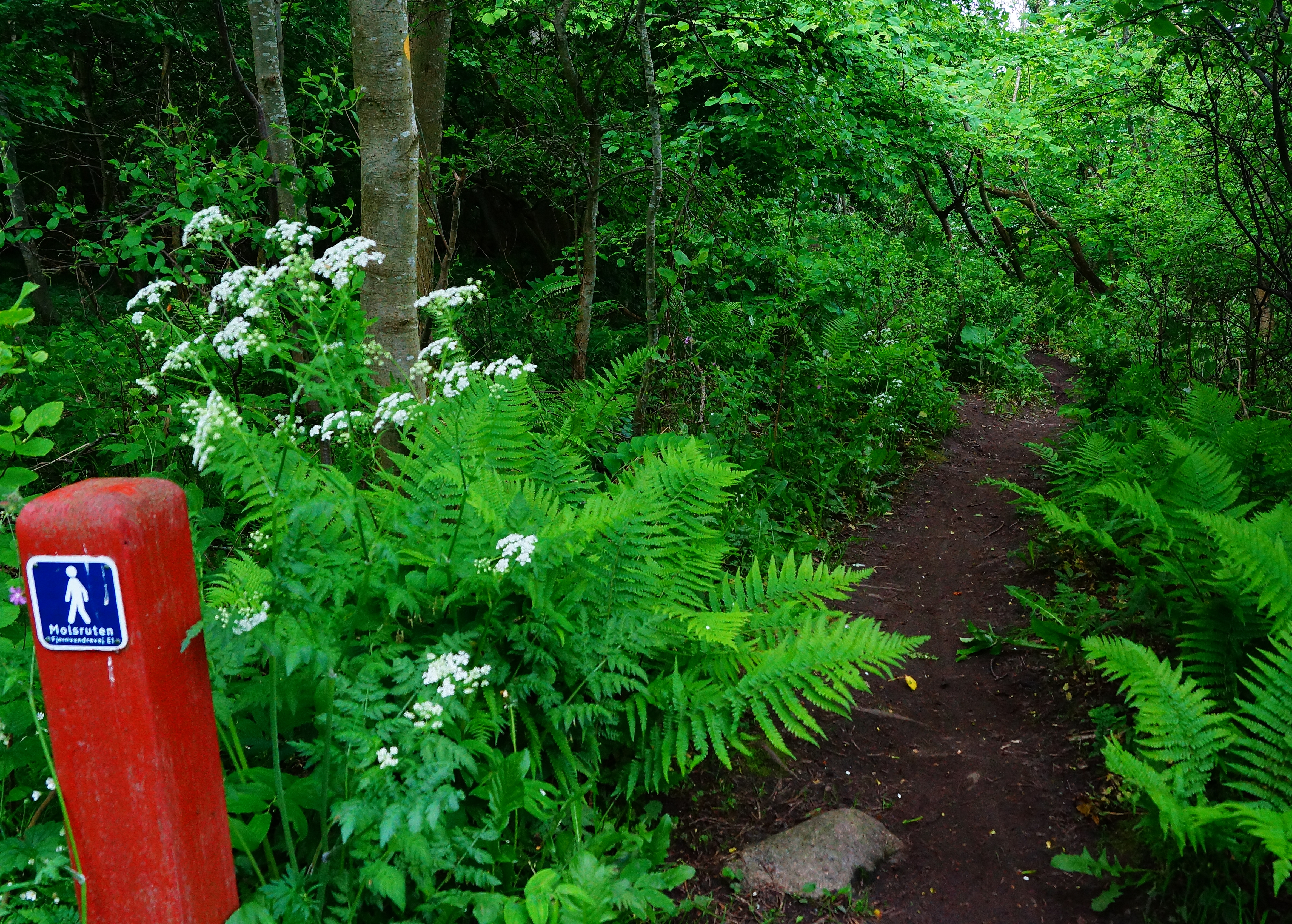 Hestehave Skov, Forårssti